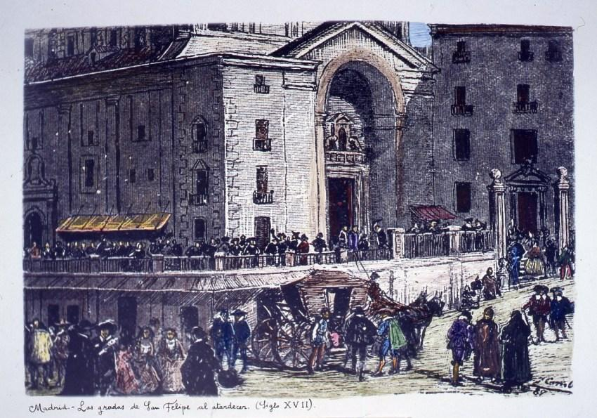 Las Gradas de San Felipe al atardecer, cerca de la Puerta del Sol de Madrid, en España.